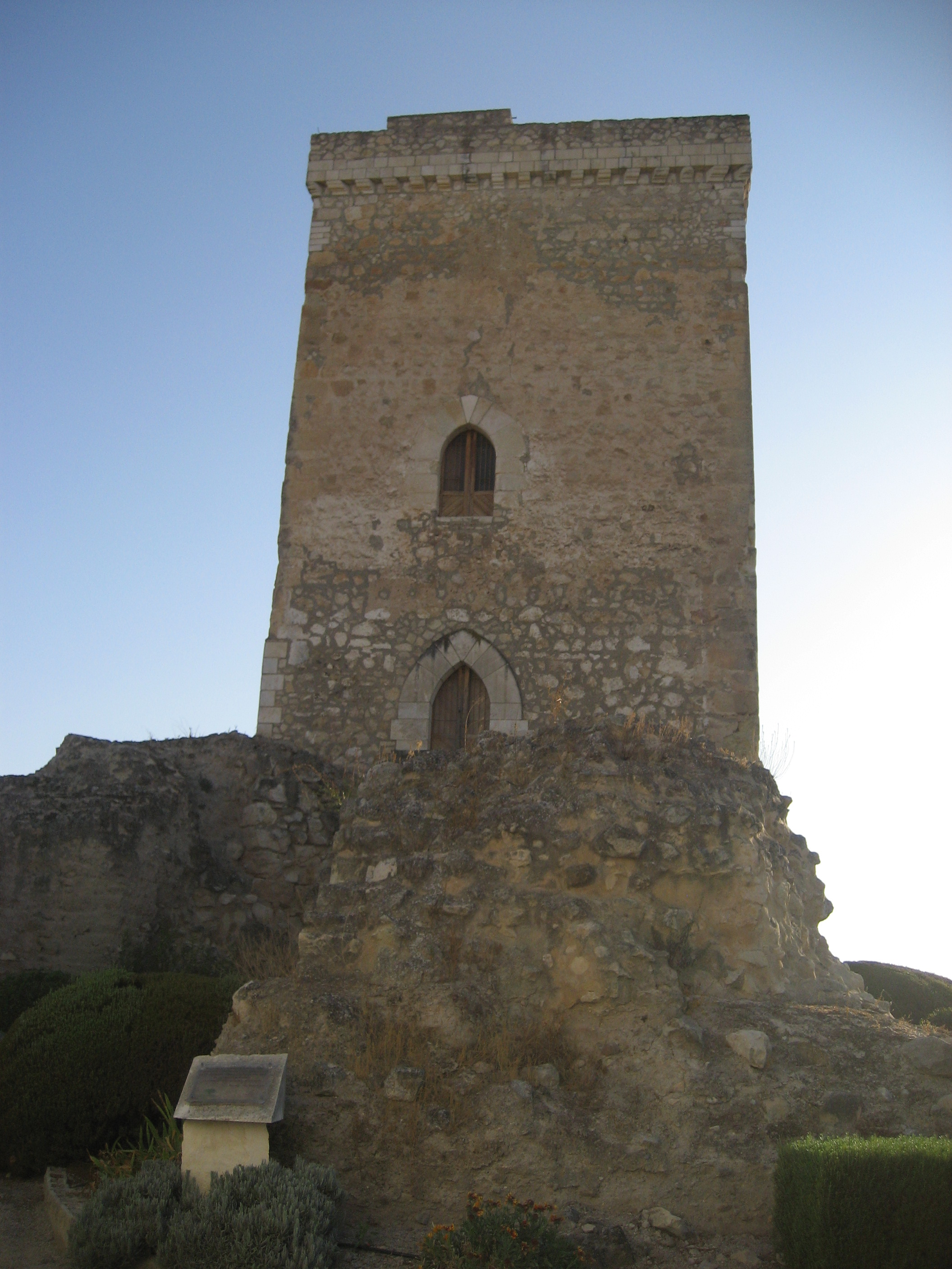 Castillo de la Edad Media, torre del homenaje con retos de muralla en la población de Monturque en la província de Córdoba Spain